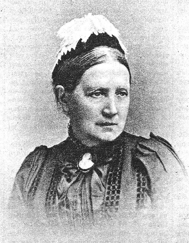 Ebba Ramsay (1828-1922)